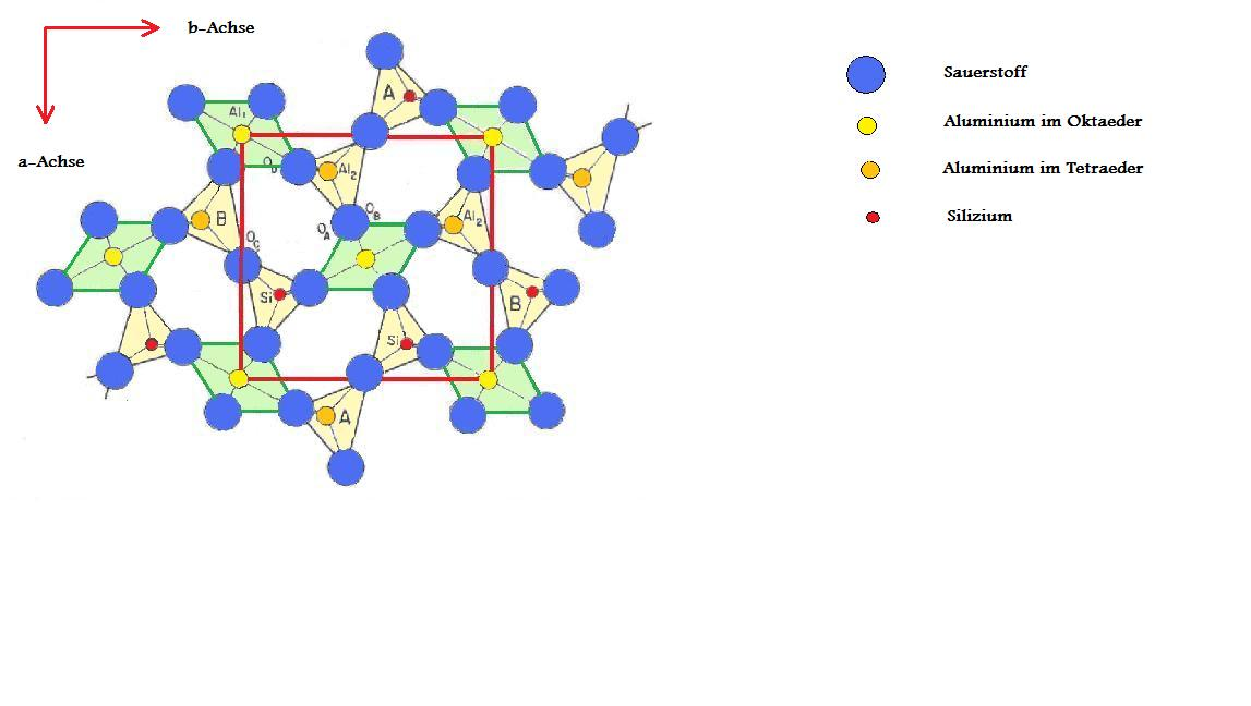 Projection of one half (from z=0 to z=1/2) of a unit cell of the mineral sillimanite onto the ab-plane Projektion einer halben Einheitszelle (von z=0 bis z=1/2) des Minerals Sillimanit auf die ab-Fläche